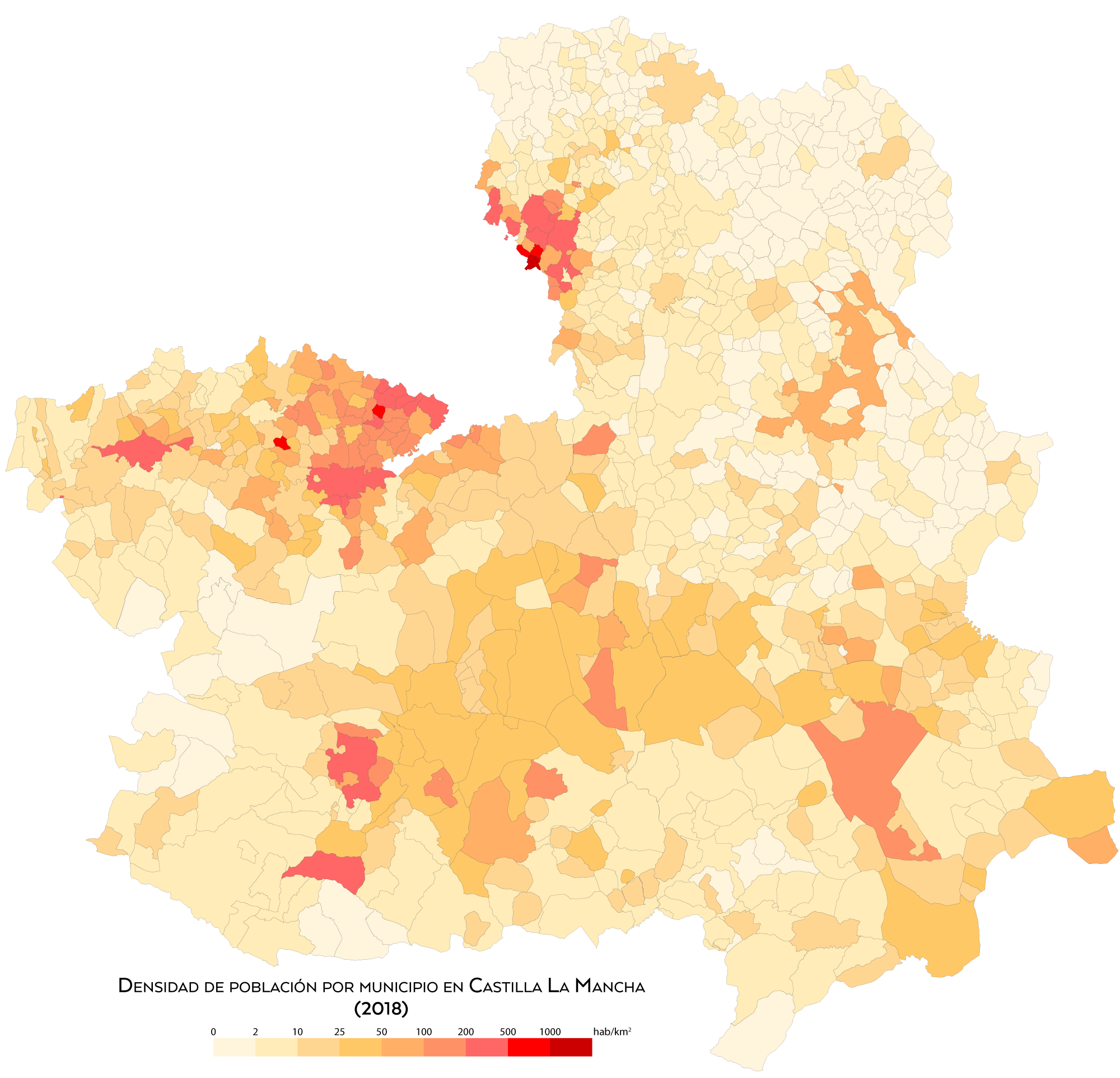 Densidad de población por municipio en Castilla La Mancha en 2018.